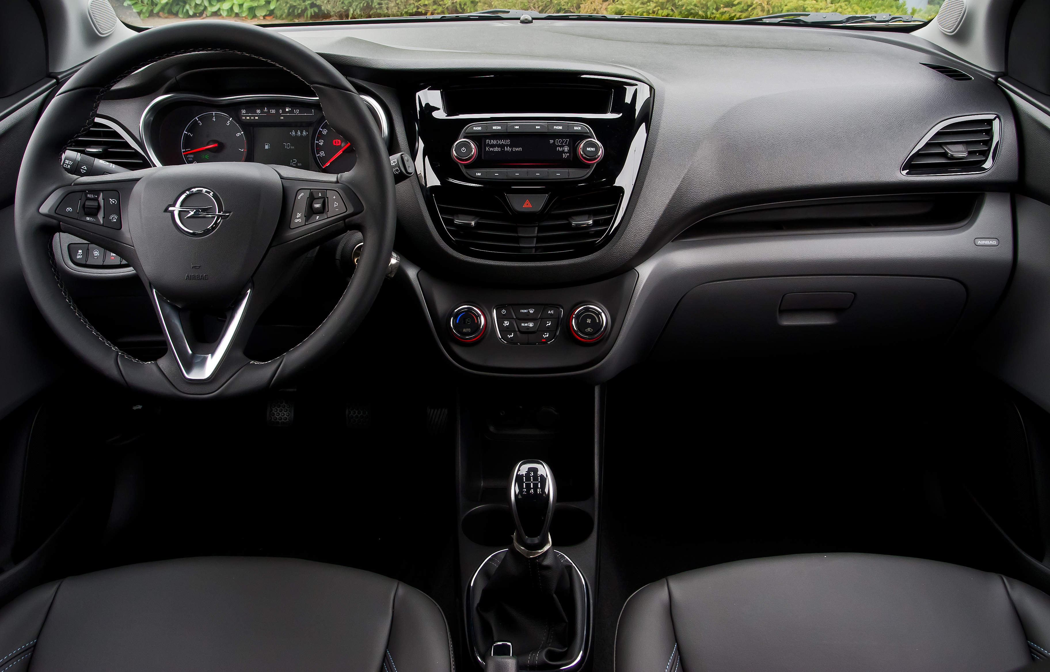 Opel Karl 1.0 ecoFLEX Exklusiv